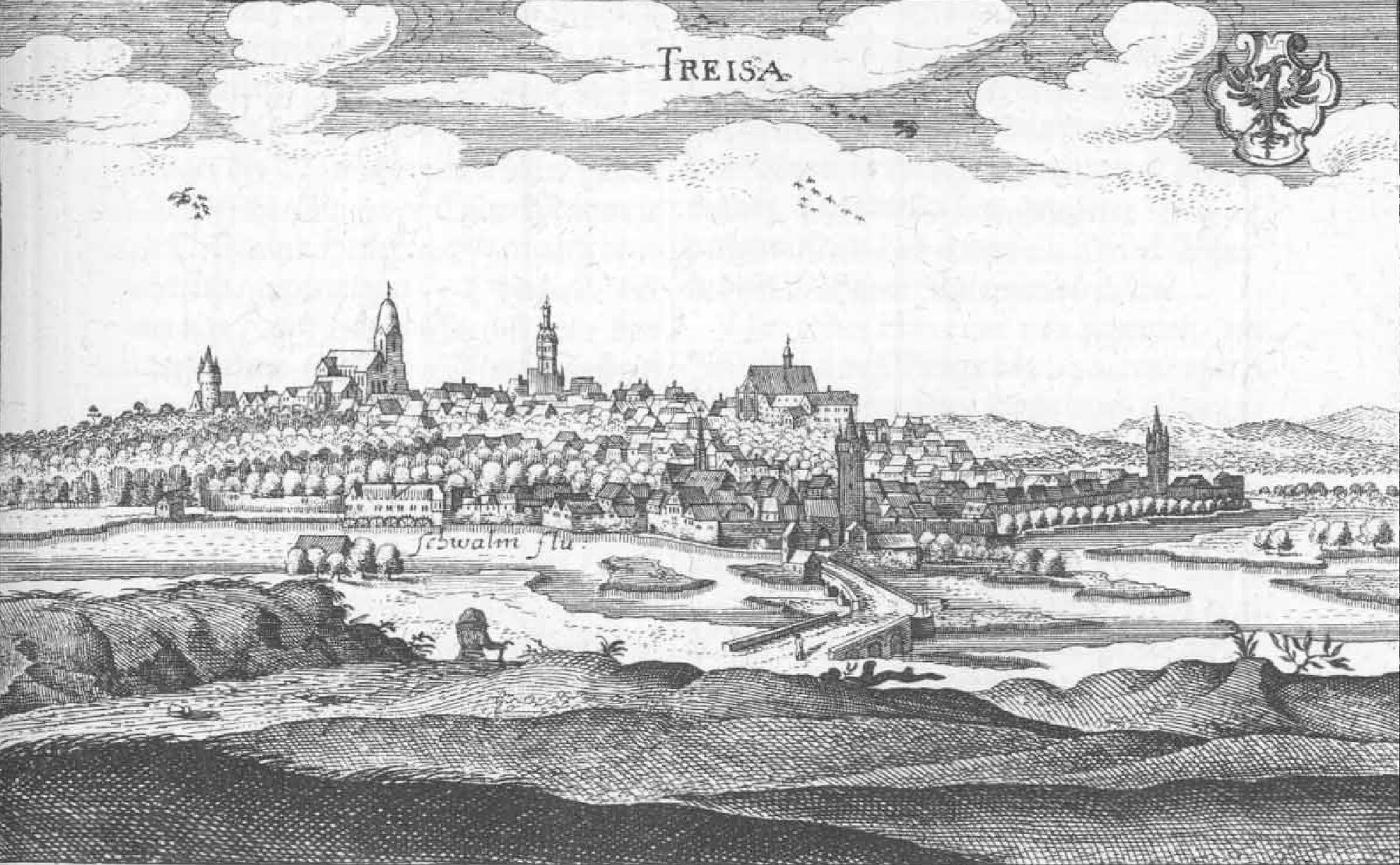 Ansicht der Stadt von Norden im Jahr 1655. Im Bildvordergrund ist der Fluss Schwalm mit der alten Steinbogenbrücke zu sehen, die erst in den 1960er Jahren abgerissen wurde. Die Verlängerung durch das Stadttor in die Stadt hinein ist die Steingasse. Links auf dem Bergrücken ist die Totenkirche zu sehen und rechts das Dominikanerkloster (die Klosterkirche ist heute die Stadtkirche). Dazwischen befindet sich das Rathaus mit einem Turm